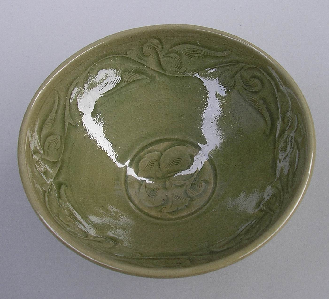 Yaochou fra Song dynastiet